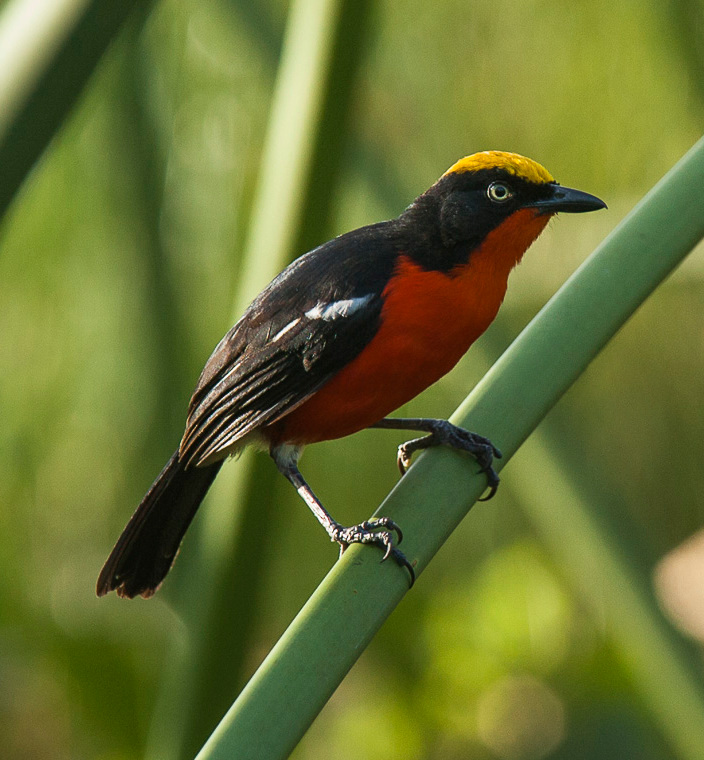 Papyrus Gonolek (Laniarius mufumbiri) - Kibale National Park, Uganda